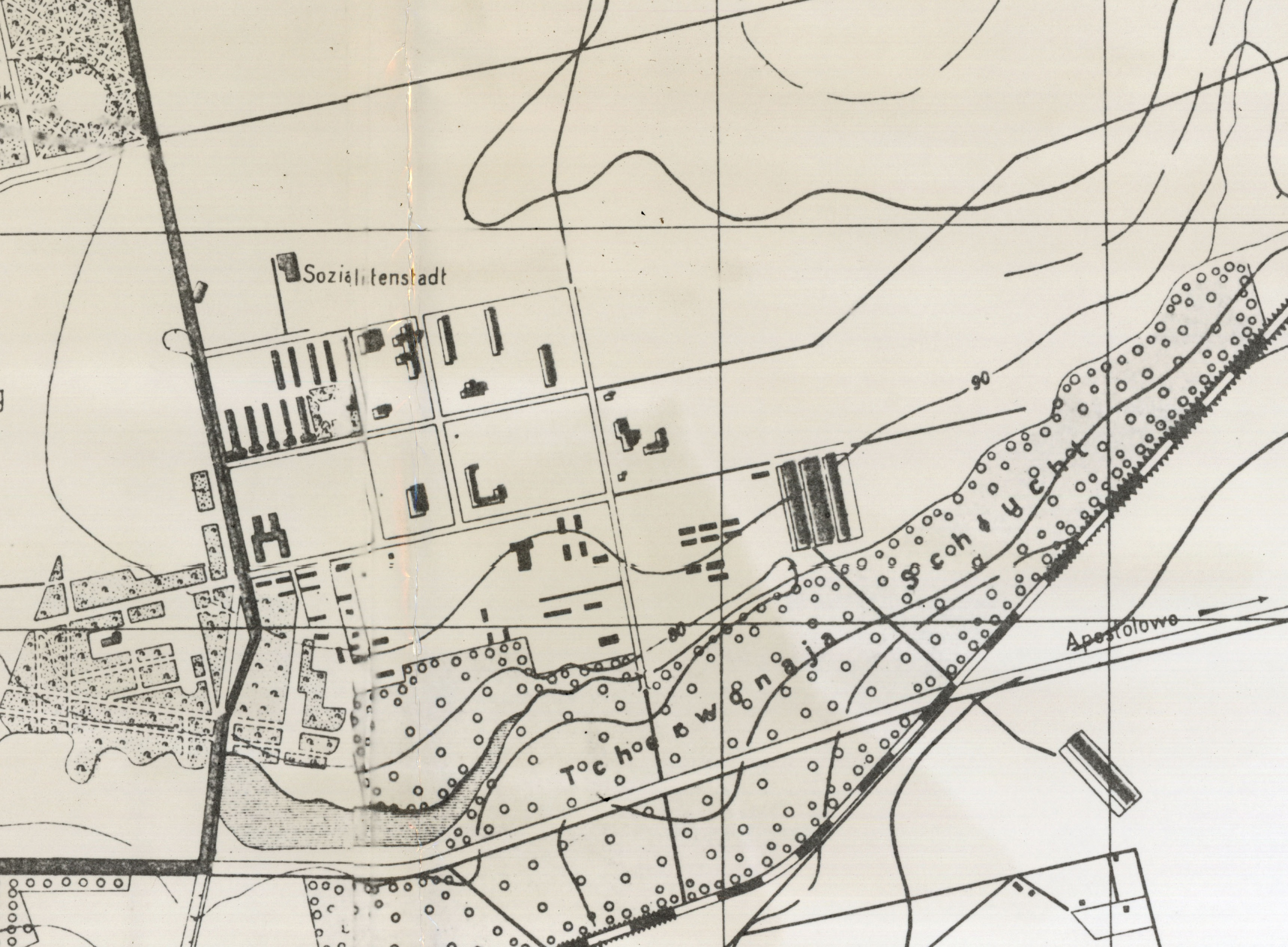 фрагмент плану м. Кривий Ріг часів німецької окупації